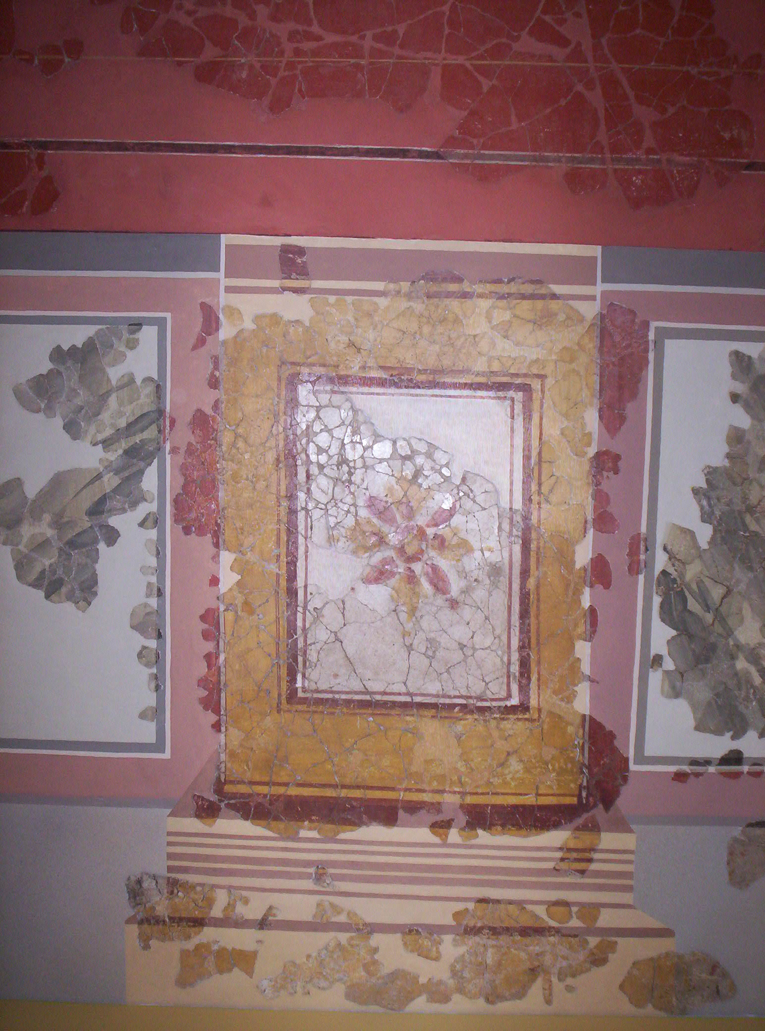 Parte central de la base del fresco de la habitación E de la Casa de los Grifos. Representa una arquitectura figurada, un plinto decorado con una flor esquemática. Se considera propio del II Estilo de los frescos romanos. Yacimiento de Complutum. Expuesto en la Capilla del Oidor (Alcalá de Henares). Diciembre de 2008